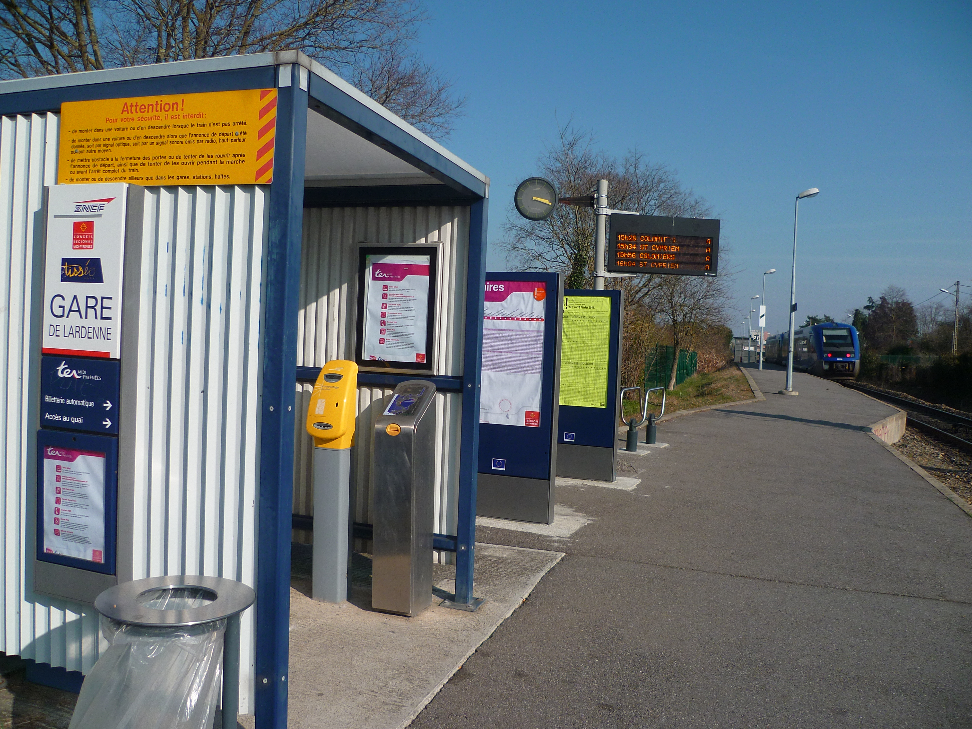 Toulouse (Haute-Garonne) : La gare de Lardenne.